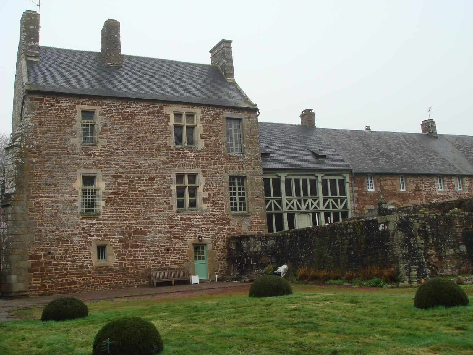 Le manoir facade sud